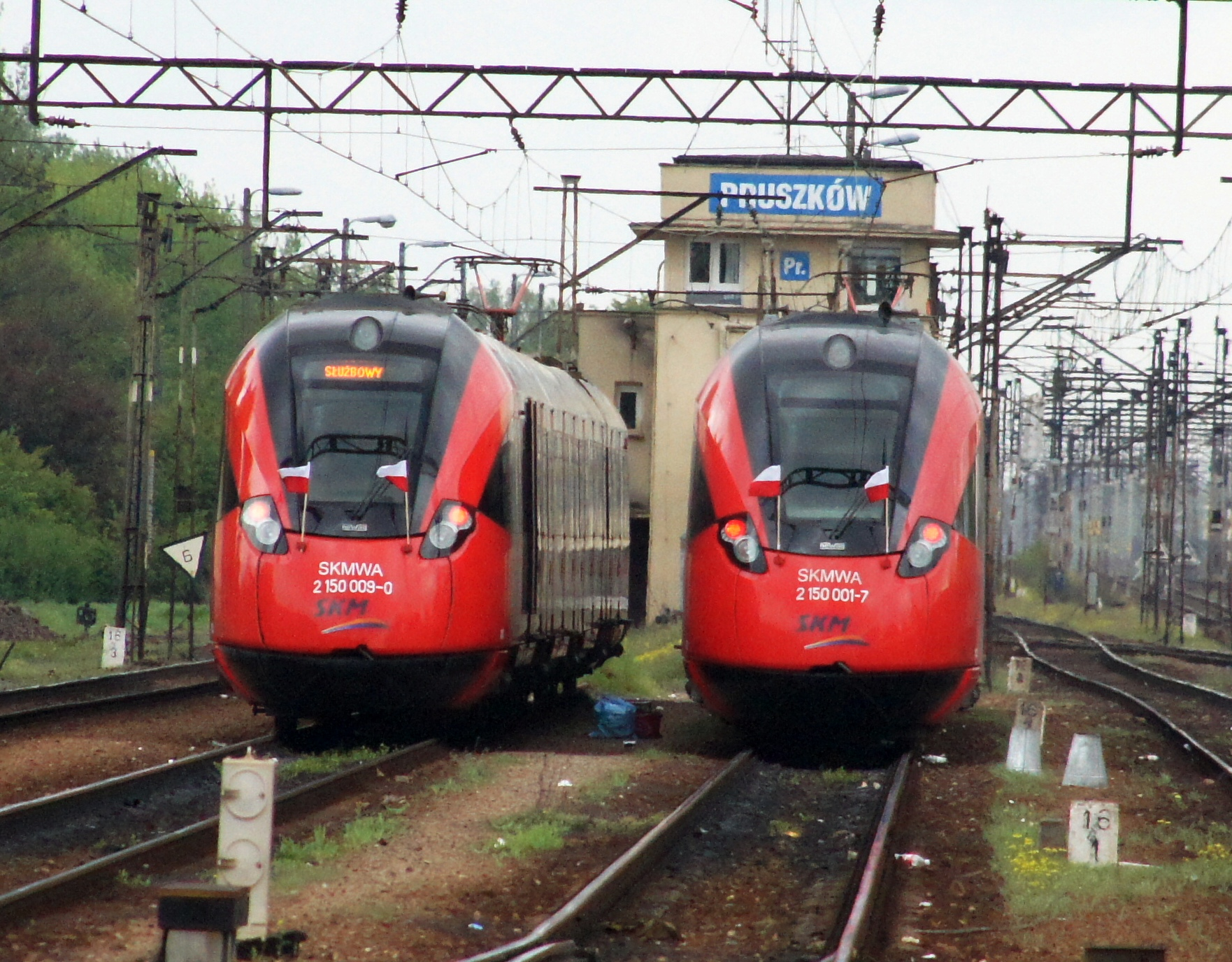 Pociągi typu 19WE - SKM Warszawa - Linia S1 - postój techniczny na torach postojowych w Pruszkowie